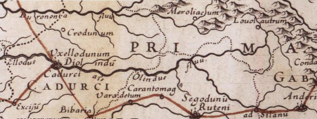 région cadurque Licensing Catégorie:Cartes Histoire de France